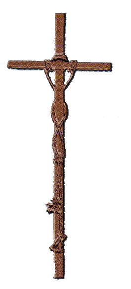 Emblema de la Hermandad de Penitencia de Ntro. P. Jesús de Medinaceli de Ocaña (Toledo)